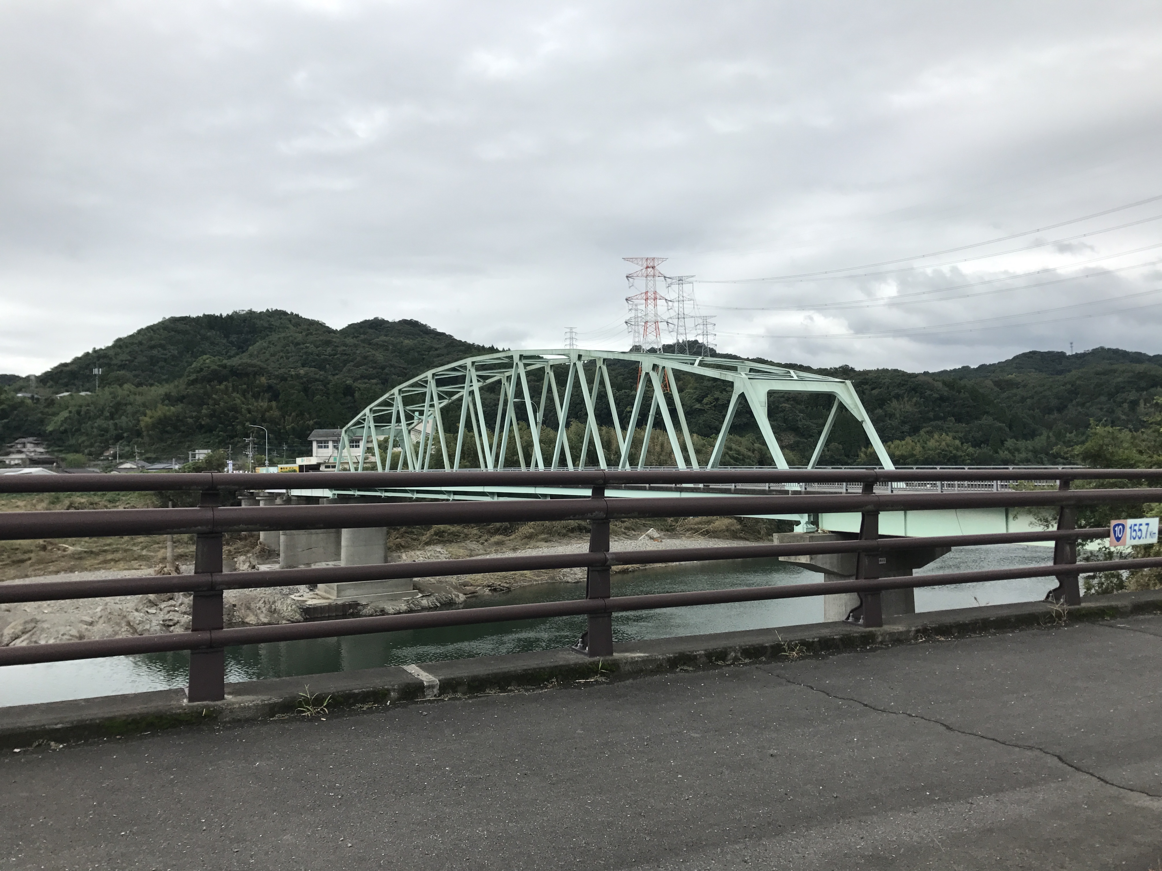 国道10号より望む筒井大橋